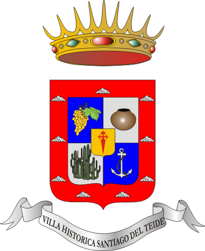 Escudo de Santiago del Teide (Tenerife)